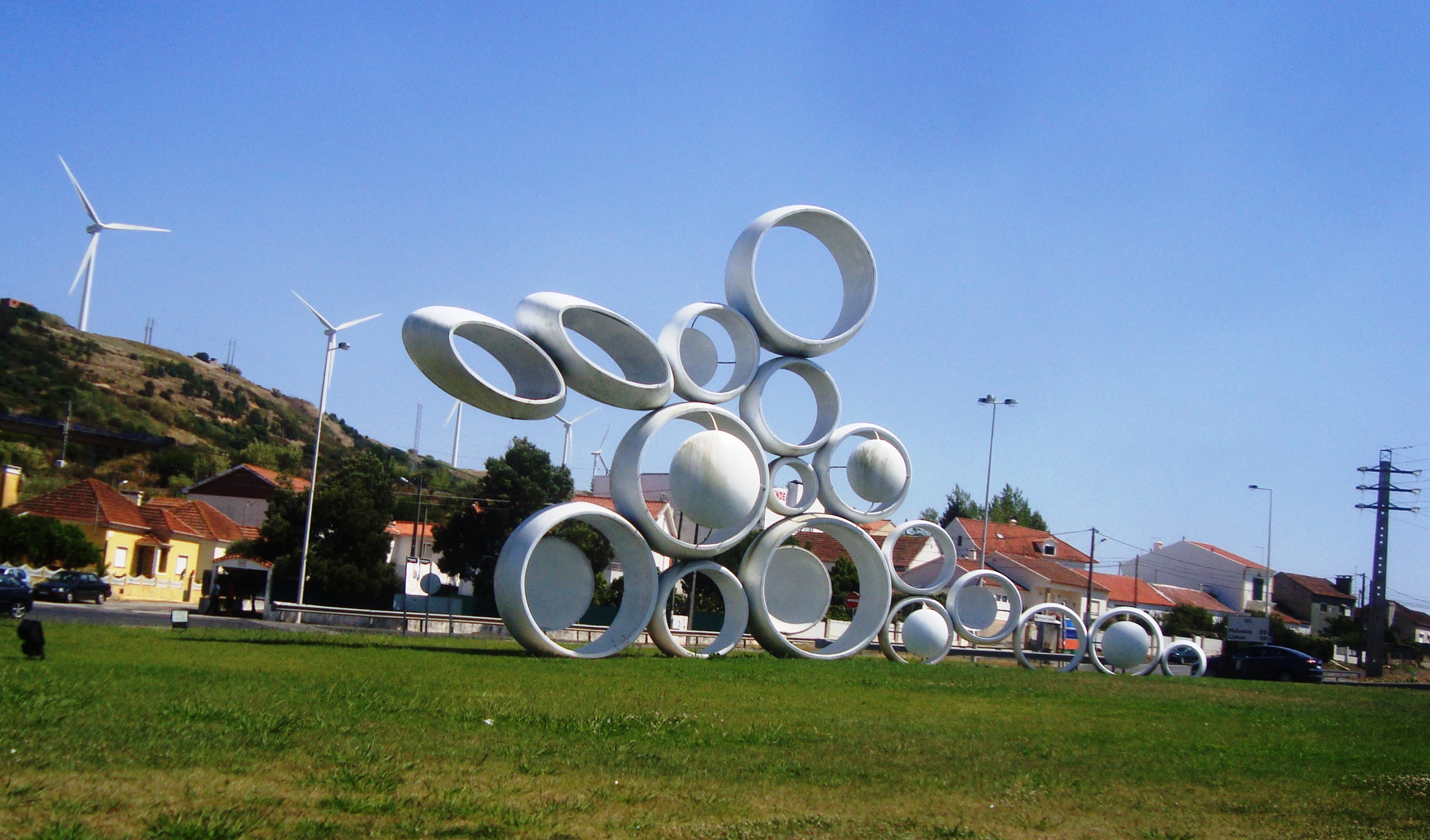 Escultura «Uvas», en el acceso sur de Torres Vedras, Portugal